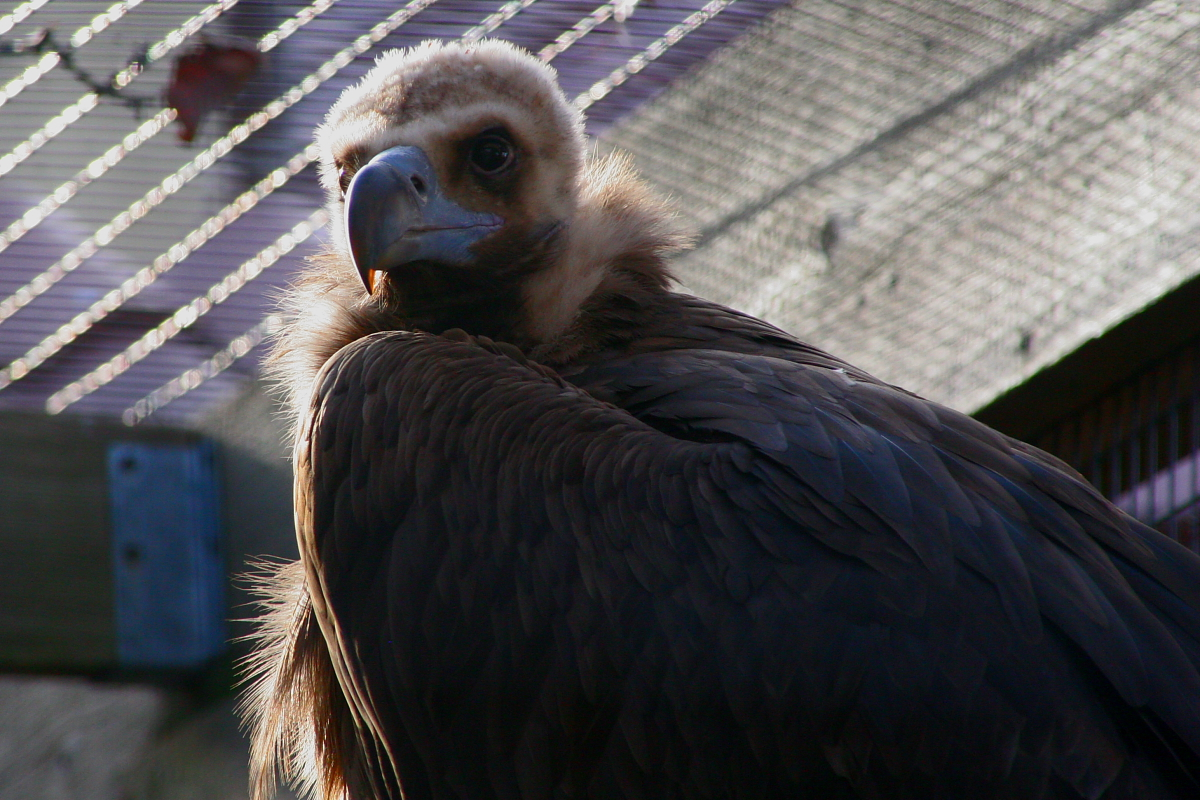 Cinereous Vulture, St. Louis Zoo